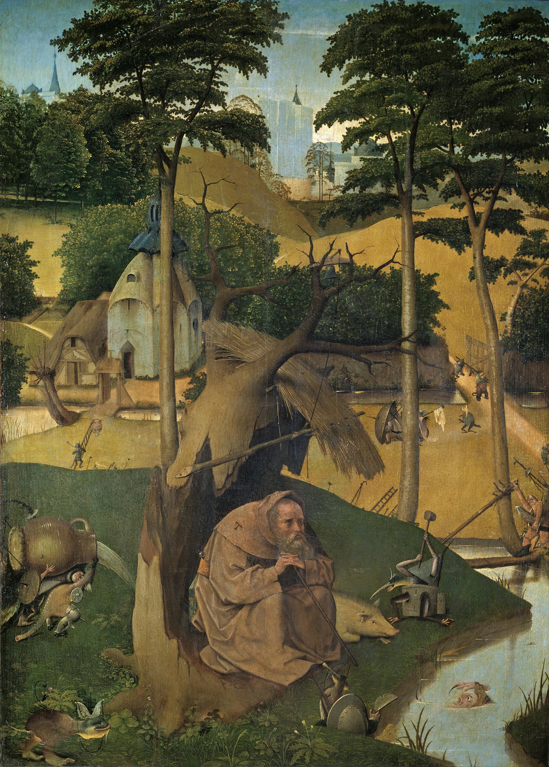 «Спокуса святого Антонія» — панно Ієроніма Босха. Дерево, олія. Після 1490. Мадридський національний музей Прадо.